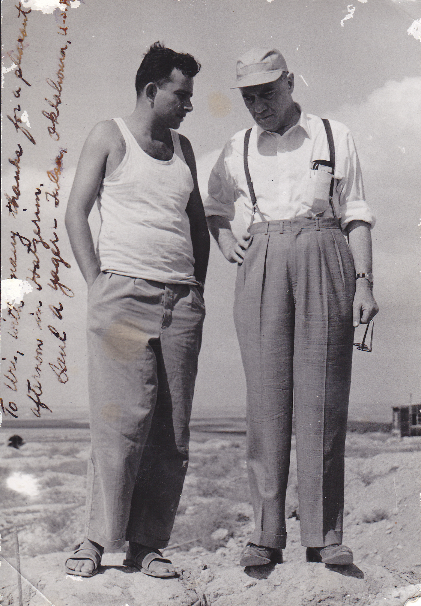 מנהל מפעל "נטפים" אורי ורבר, עם ממציא הטפטפת, שמחה בלאס